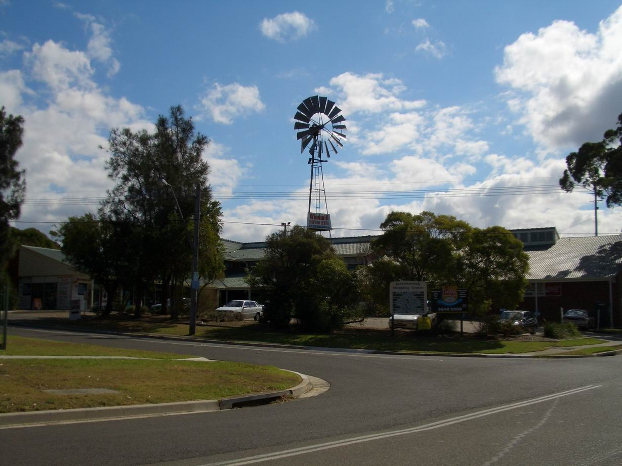 Yarrawarrah Shopping Village